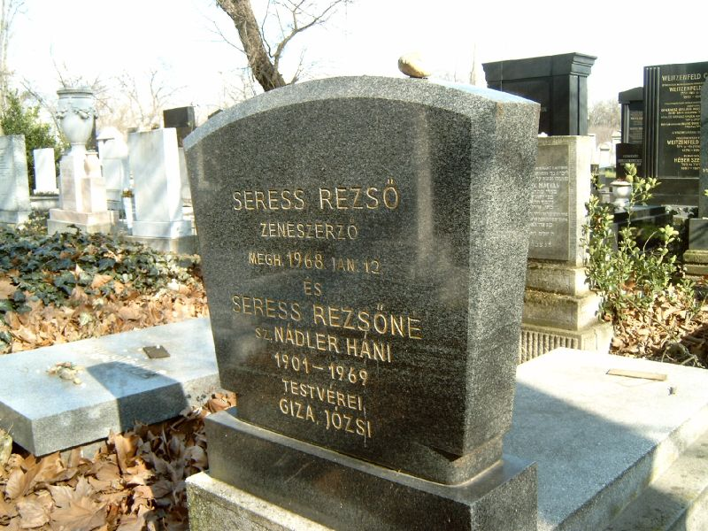 Seress Rezső (született Spitzer Rudi) (Budapest, 1889. november 3. – Budapest, 1968. január 11.) zeneszerző, zongorista sírja Budapesten a Kozma utcai izraelita temetőben.